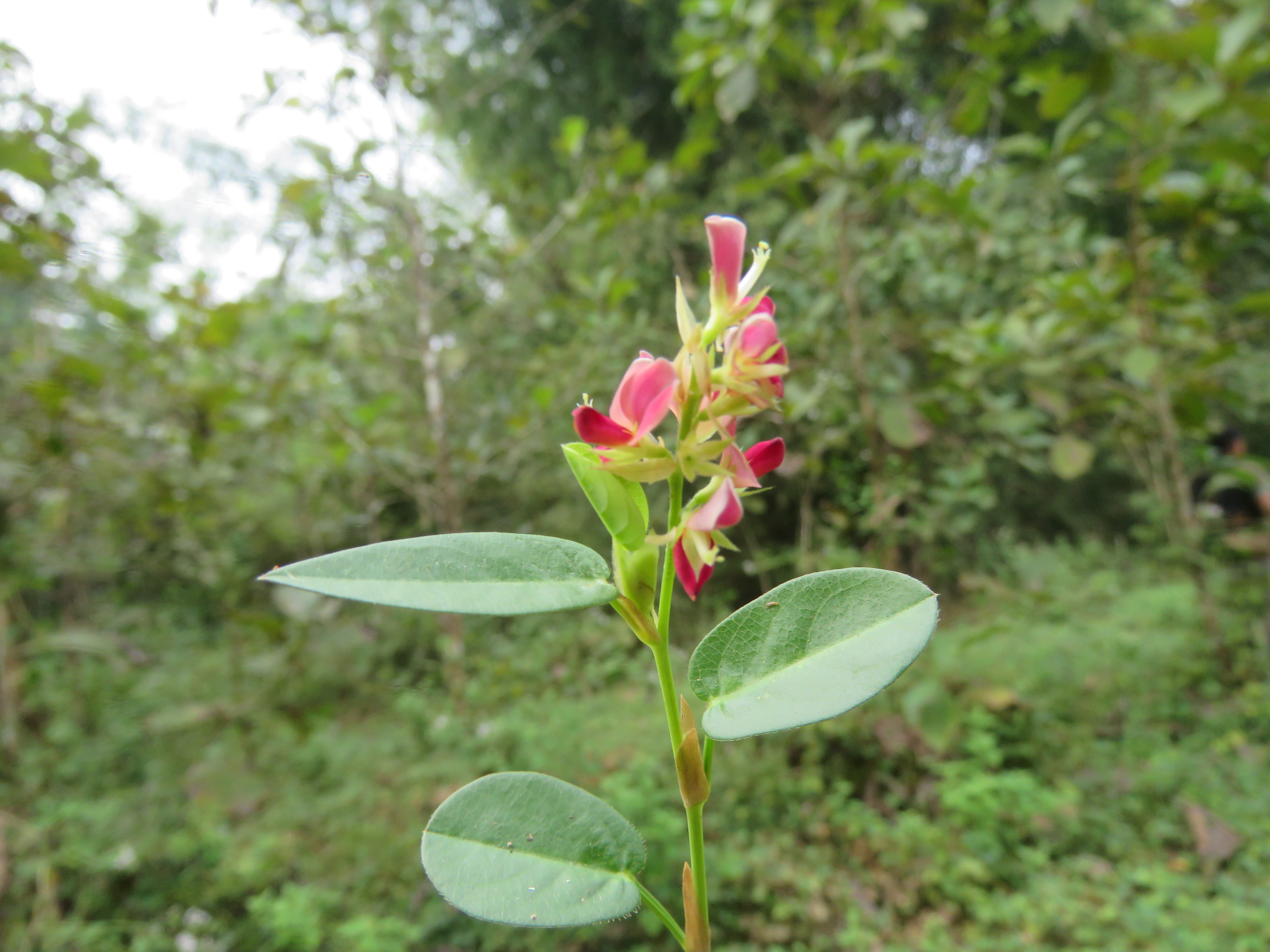 Photos by Vinayaraj